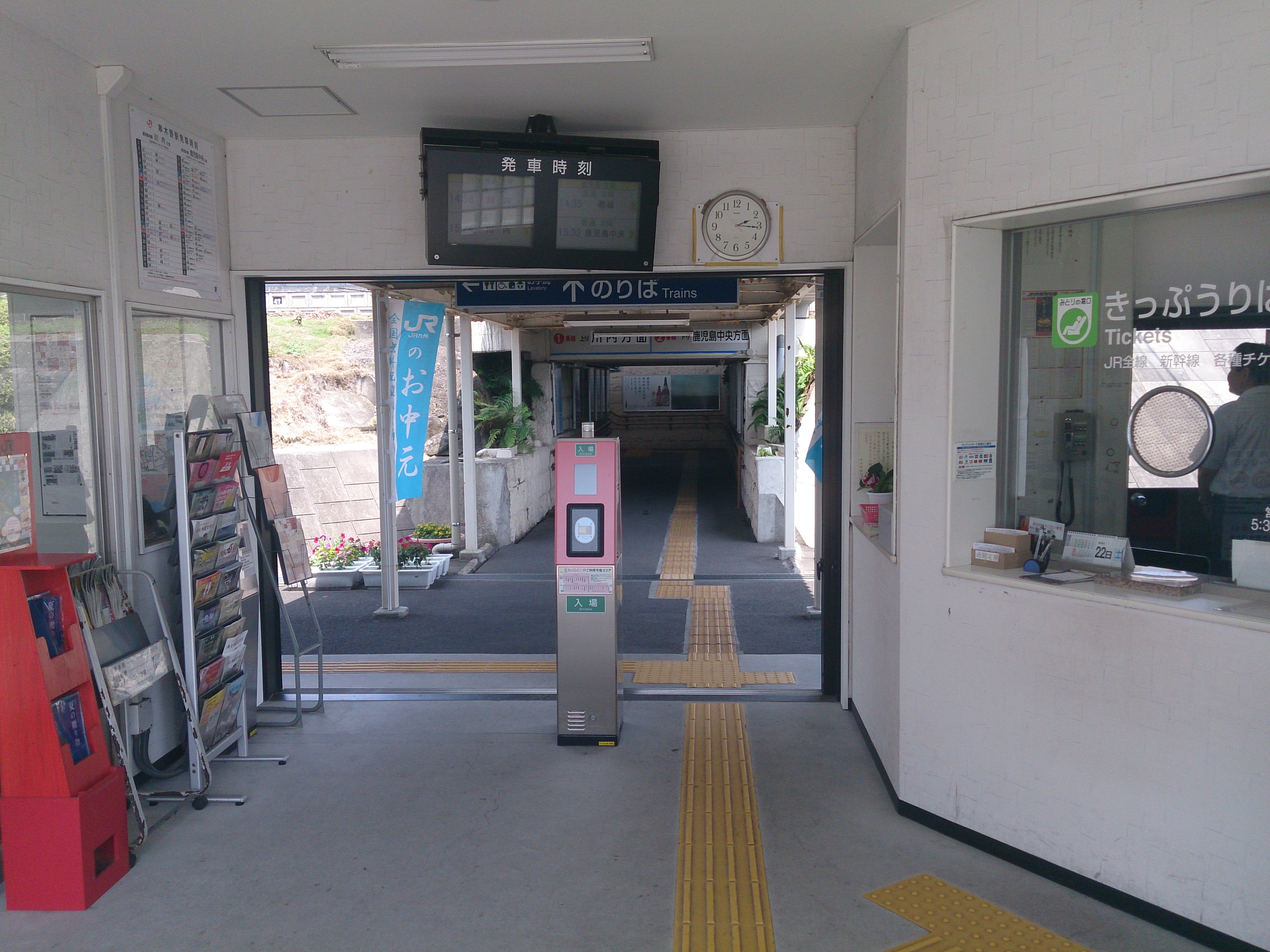 串木野駅駅舎内